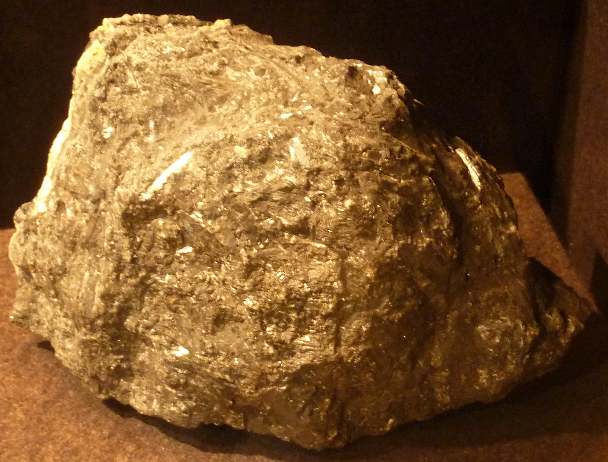 Stibine trouvée à Kerfeuteun [désormais englobé dans Quimper] (Maison des minéraux de Crozon)